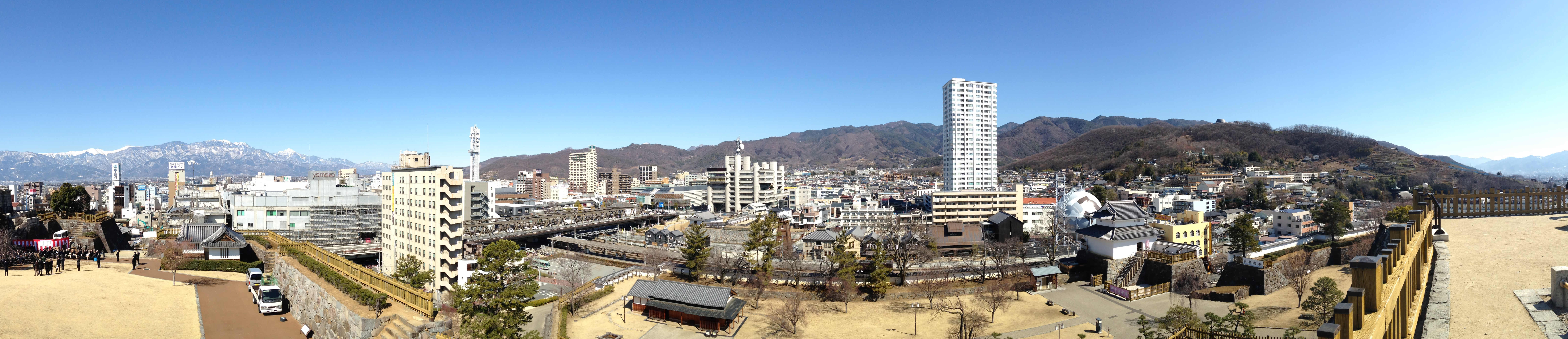 甲府盆地のパノラマ(甲府城跡より北側)